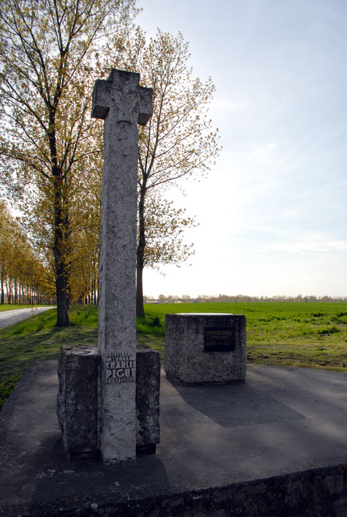 Ce monument est en bordure du champ où est tombé Charles Peguy en 1914